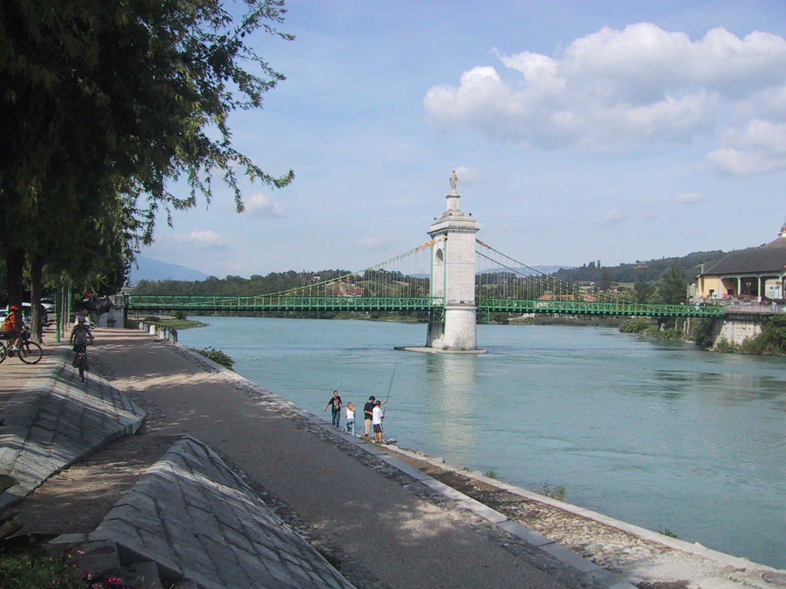 Le vieux pont suspendu de Seyssel (1838). Il relie les deux parties de Seyssel chacune sise sur un département différent : à gauche l'Ain, à droite la Haute-Savoie.